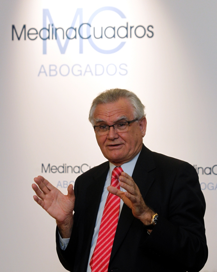 El abogado y escritor Manuel Medina González durante un acto de presentación en su despacho Medina Cuadros Abogados.